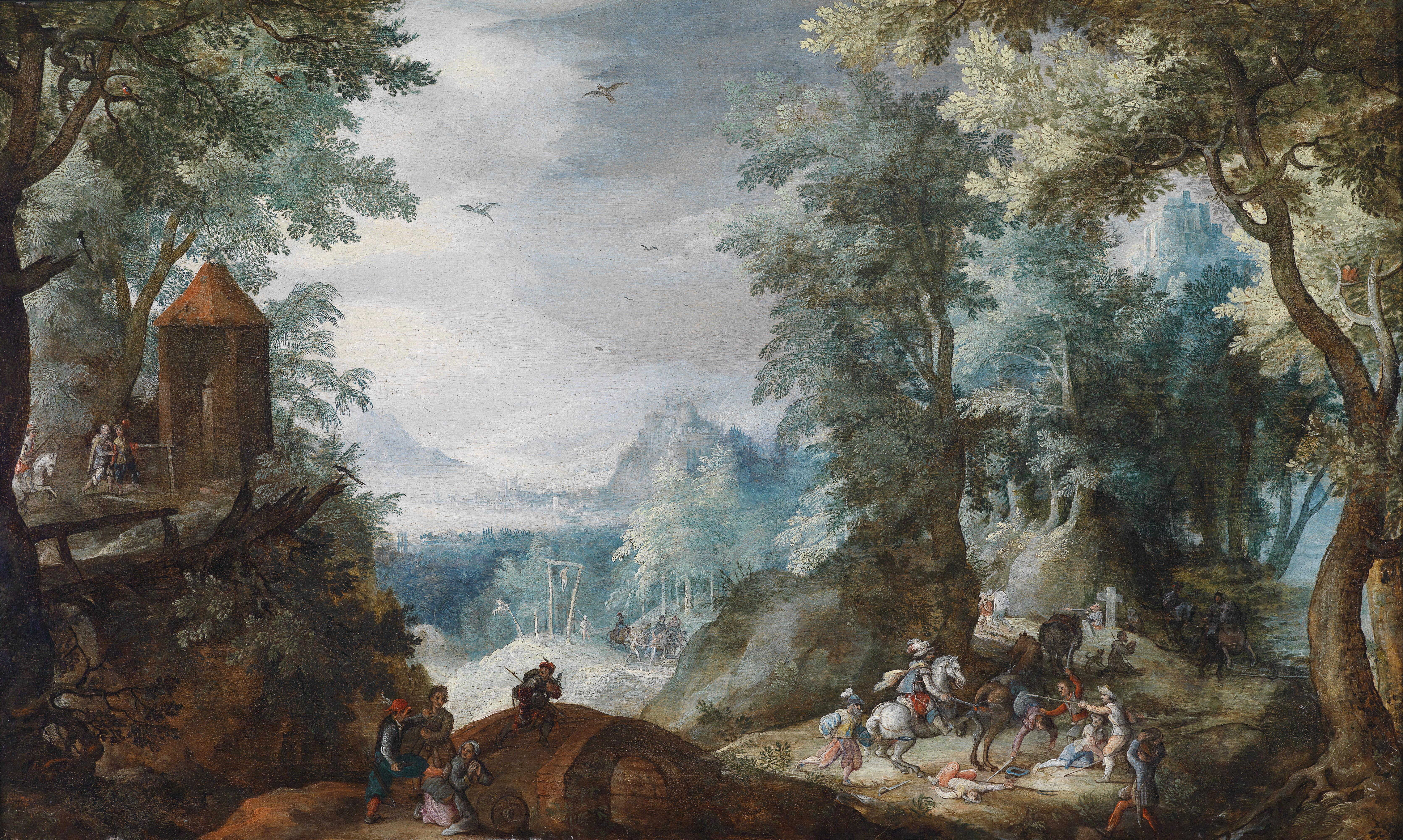 Bewaldete Landschaft mit einem Überfall, Öl auf Holz, 33 x 54 cm